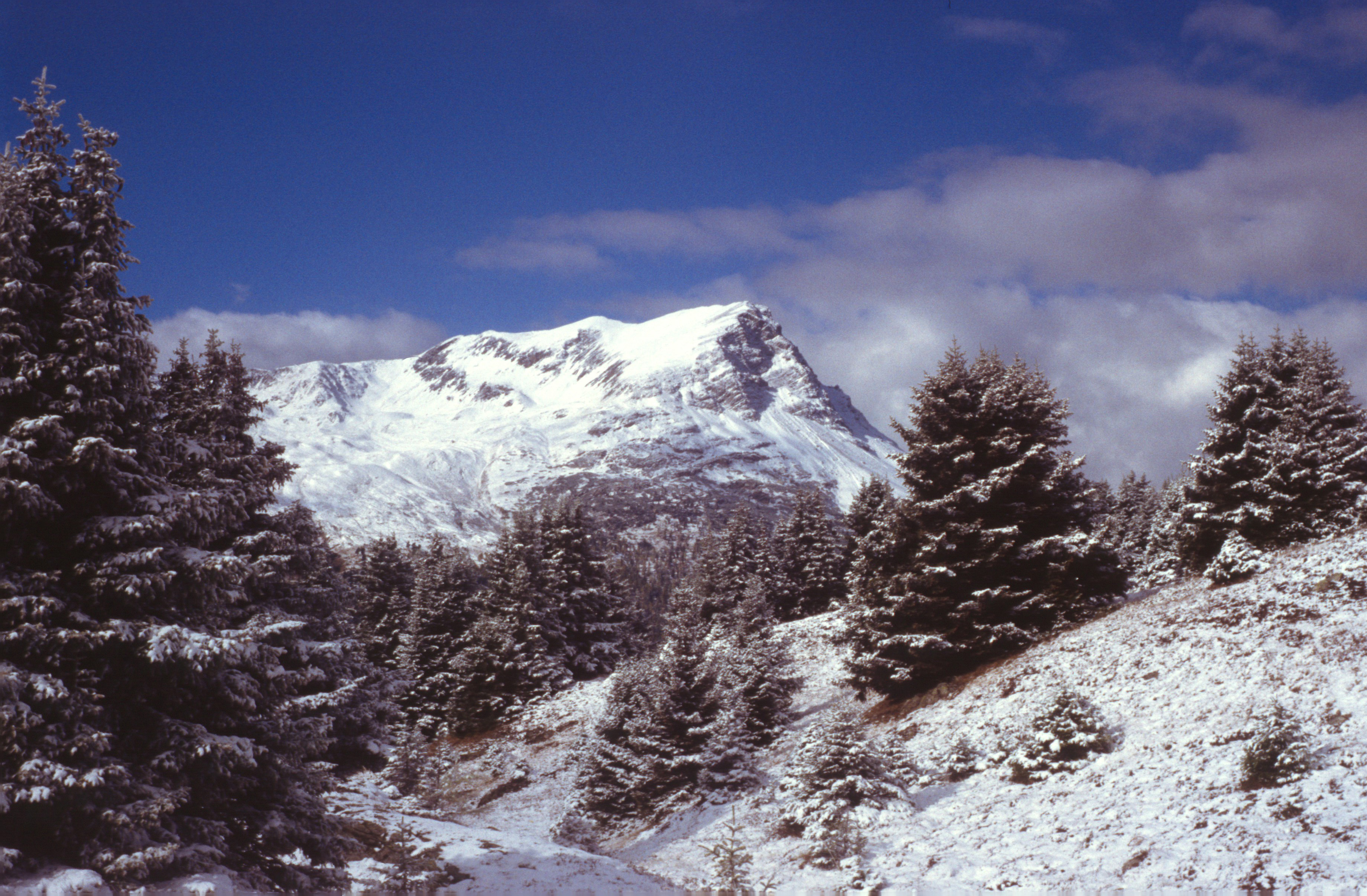 Piz Lad von Osten